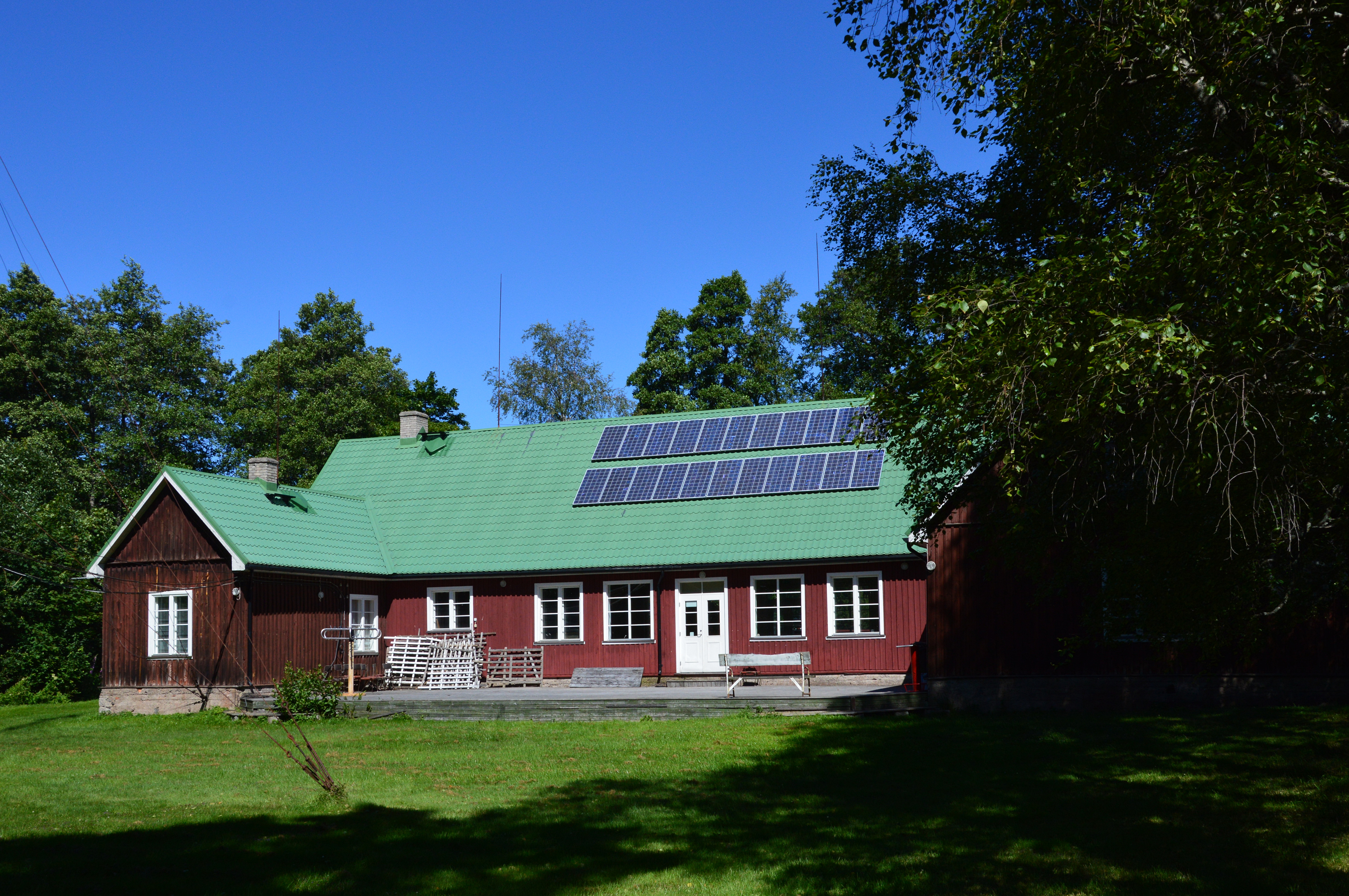 Prangli rahvamaja